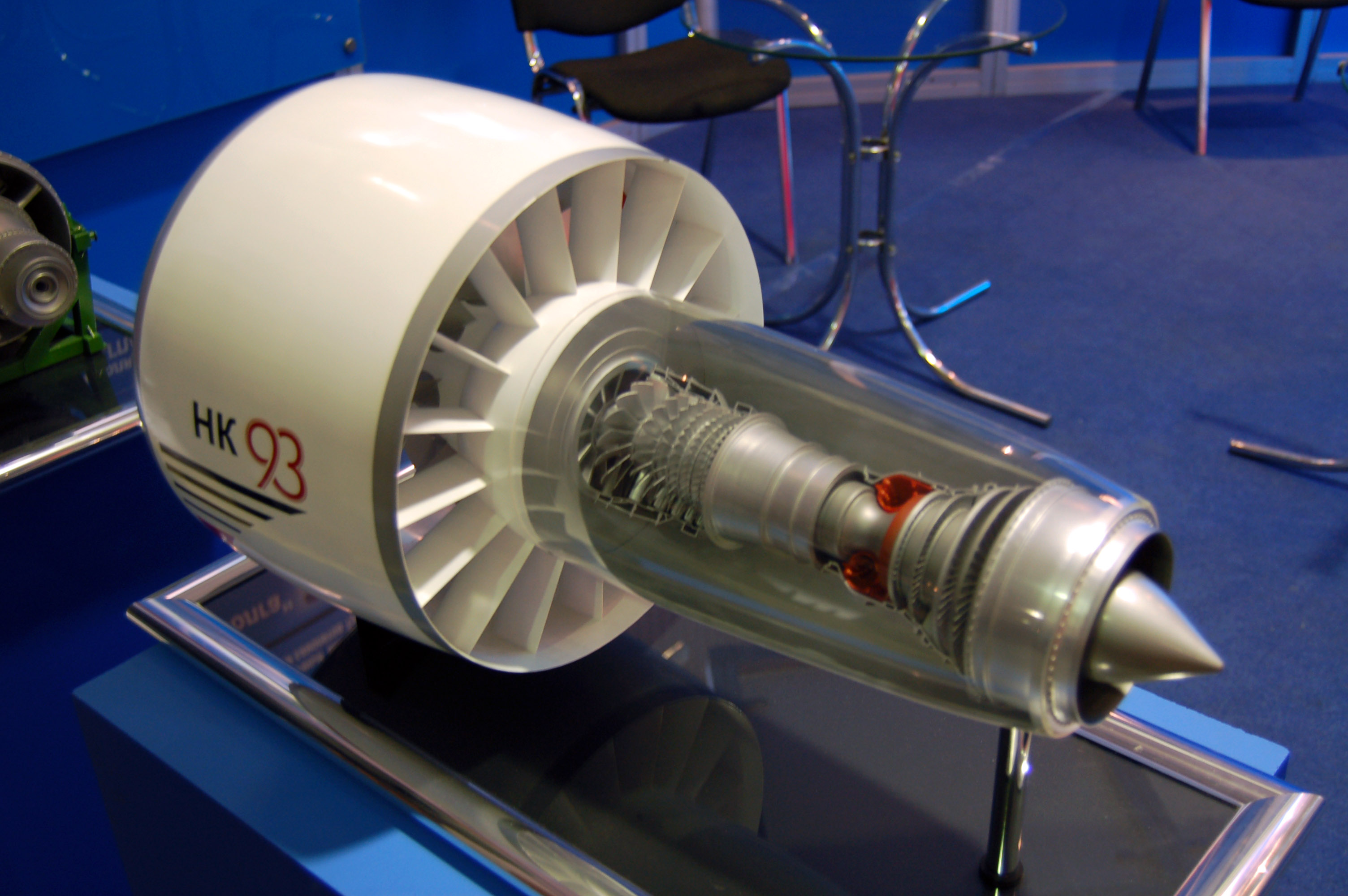 Макет двигателя НК-93 на МАКС-2009.